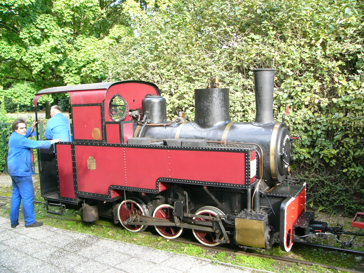 Locomotive à vapeur sur voie étroite DECAUVILLE, type 030 au Chemin de fer des Chanteraines. Locomotive DECAUVILLE N° 1770 de 1920 type Progrès. Numéro de chaudière 5750, éprouvée à l'usine de Corbeille 28 Avril 1920 et livrée le 1er Juillet de la même année à Morillon et Corvol. Elle est rachetée ensuite par les Ciments d'Origny Sainte Benoîte avec les mêmes numéros. Achetée par un particulier en 1970, elle a circulé sur différents réseaux touristiques en région parisienne (St Eutrope, CIP, MTVS). Cette locomotive est arrivée en 1987 sur le Chemin de Fer des Chanteraines . Cette machine est classée Monument Historique